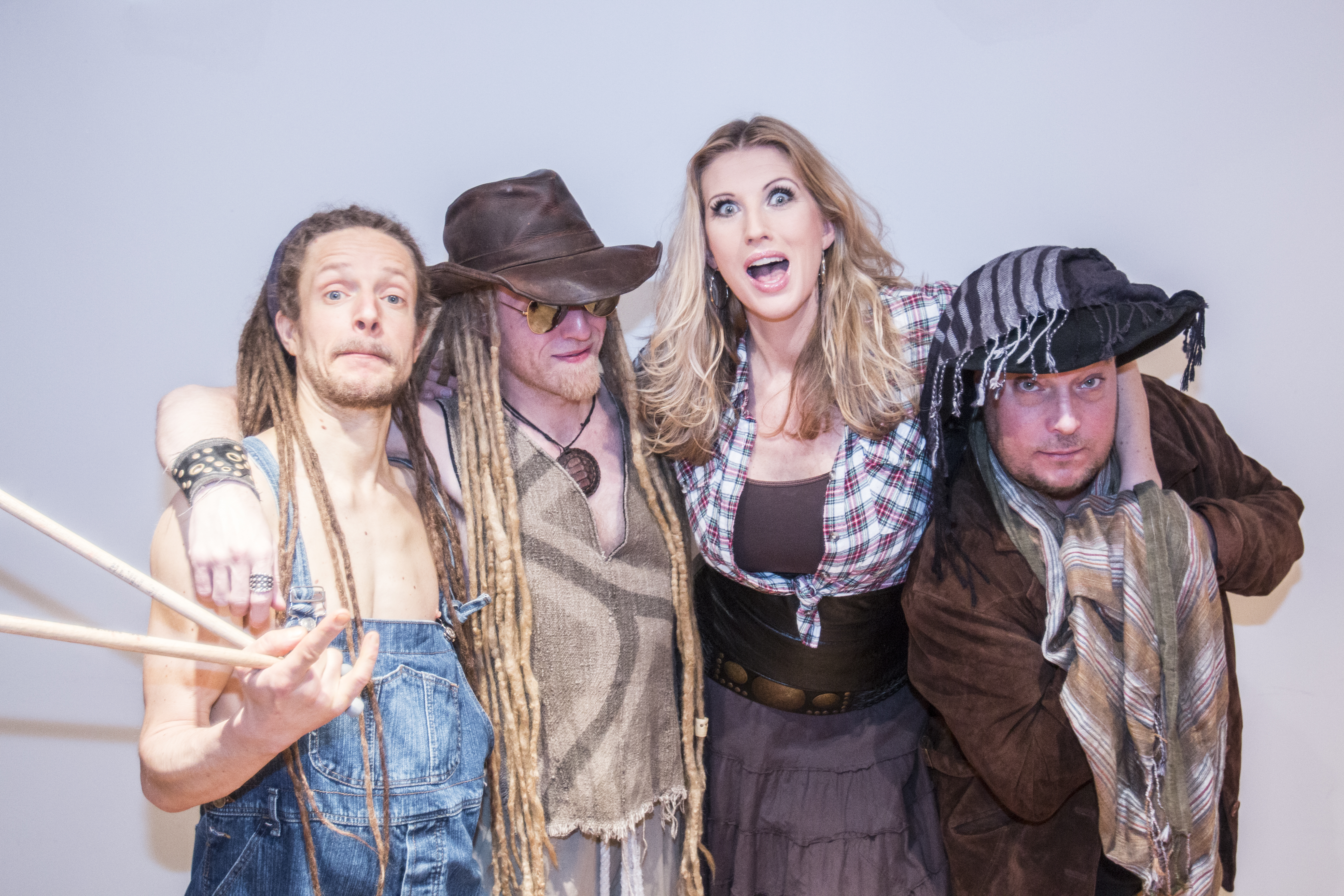 Rednex i december 2015 (Kristiansand, Norge) FOTO: Kristian Hole